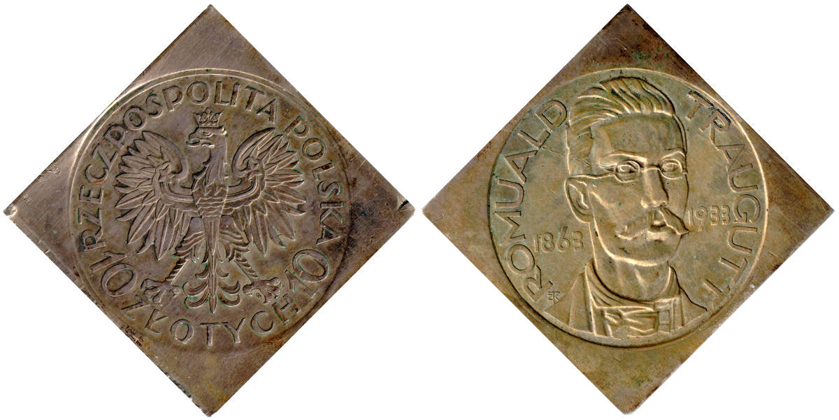 Klipa 10 zlotych Romuald Traugutt